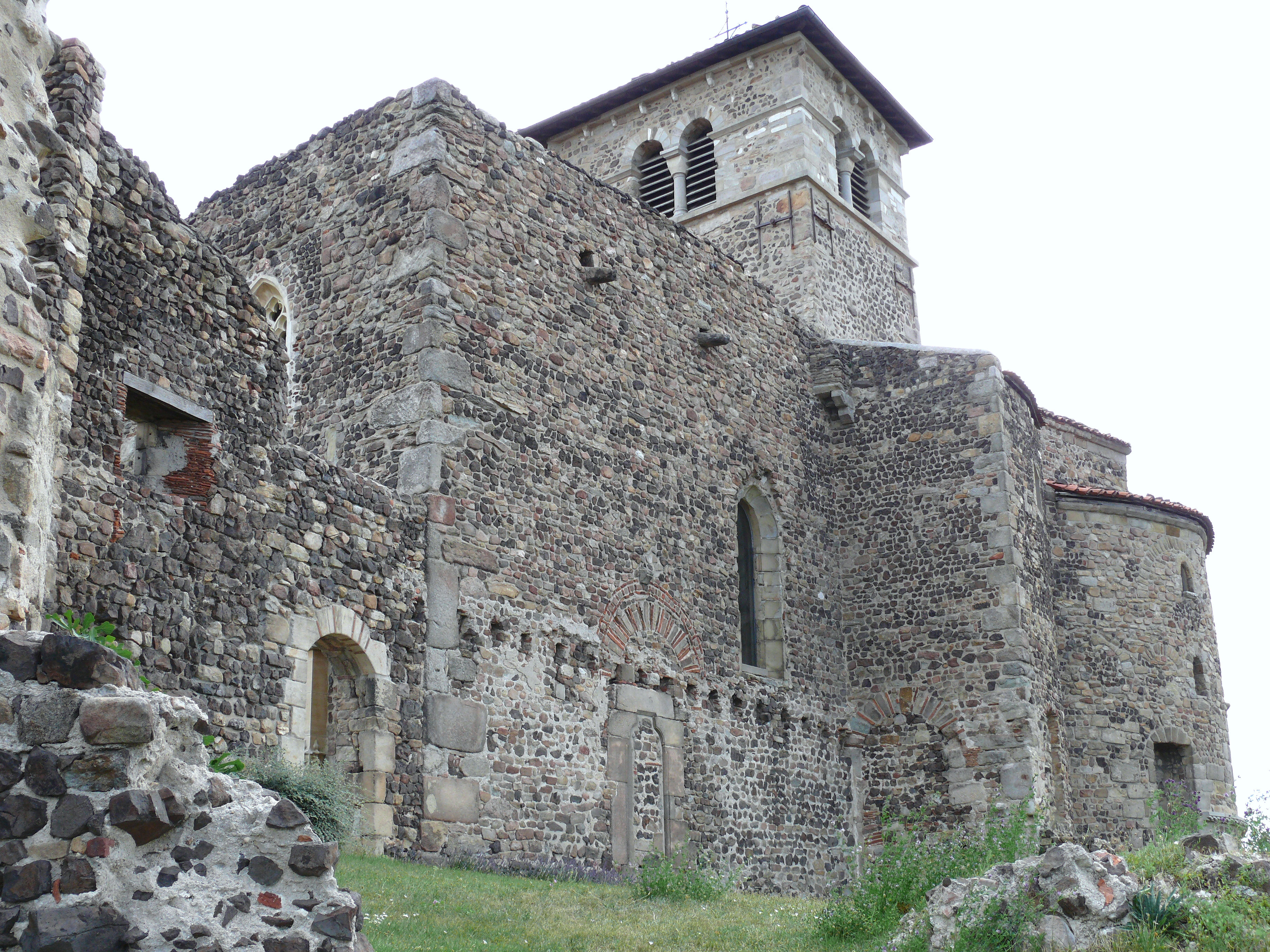 Saint-Romain-le-Puy - Eglise du prieuré - Façade sud du Xe siècle